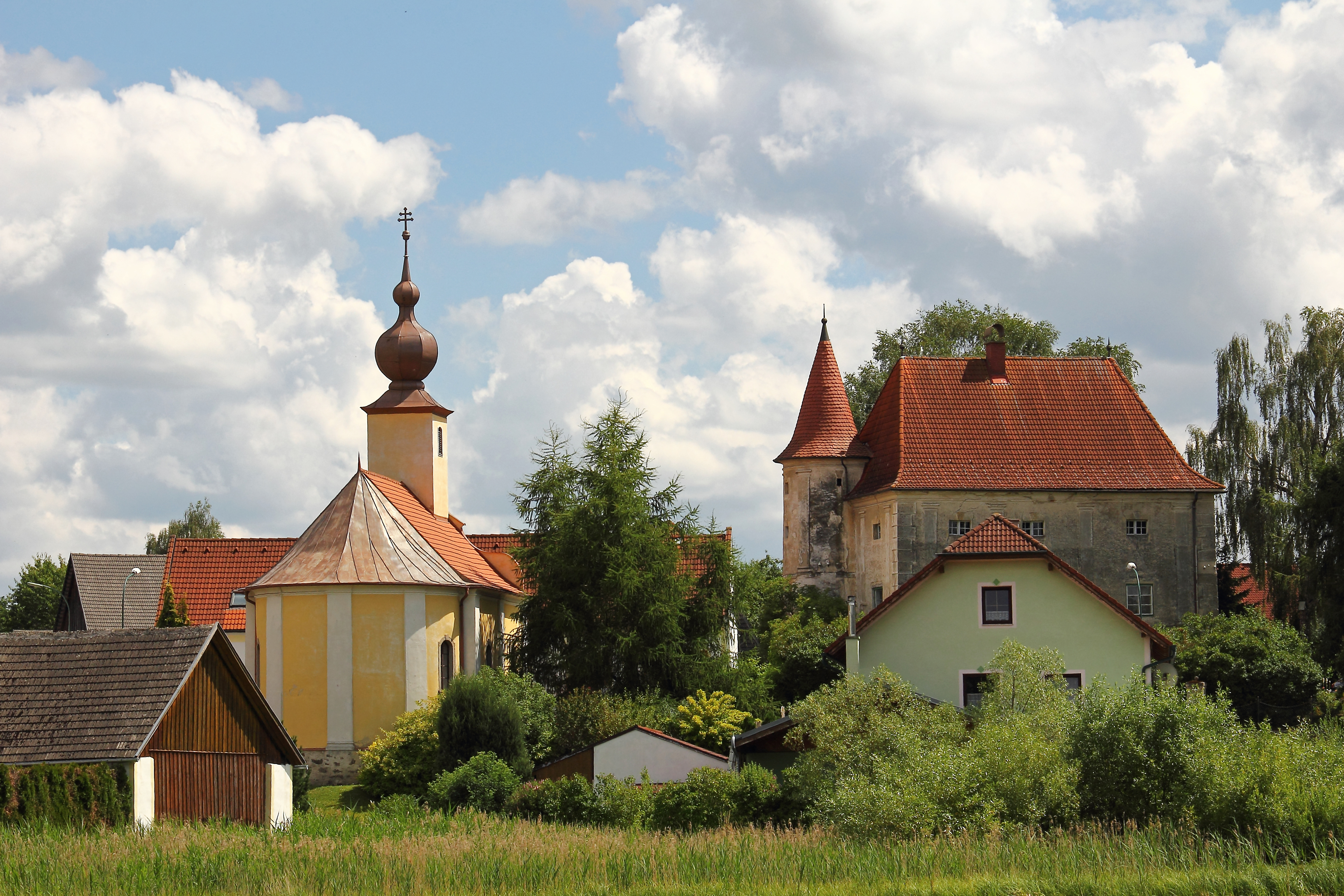 Die Ortskapelle hl. Barbara wurde im Jahr 1777 errichtet. Das Schloss Ehrendorf war eine Gründung der Arndorffer und wurde 1427 erstmals urkundlich erwähnt.